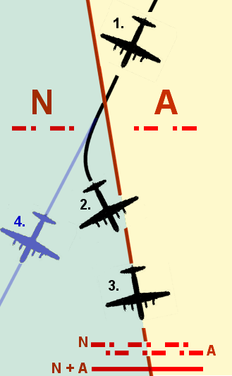 Flugunfall United Airlines 610